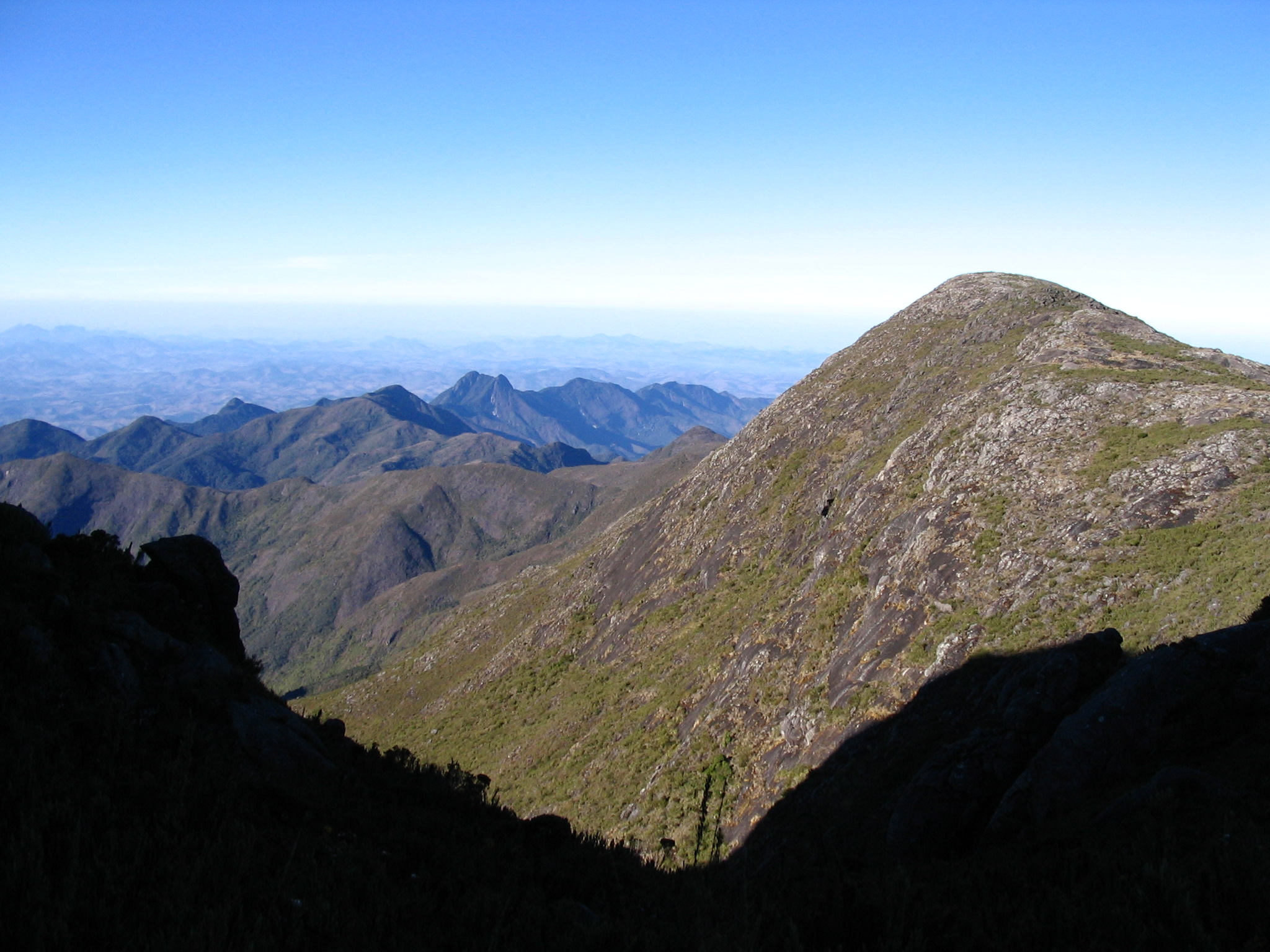 Vista da porção Sul do Parque Nacional do Caparaó na trilha de acesso ao Pico da Bandeira. A direita vê-se o Pico do Calçado. Fotografia de Alex Hubner tirada 27/07/2006 as 7h50. Temperatura no momento da foto: 5 graus centígrados abaixo de zero. Vento: zero. Na linha do horizonte, à esqueda é possível notar um sutil contorno do Dedo de Deus na Serra dos Órgãos (RJ), distante quase 400 km em linha reta.